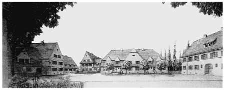 Gartenstadt am Mühlrain, Thaerstraßenviertel, Halle (Saale), Entwurf: Architekt Hermann Frede (1913)